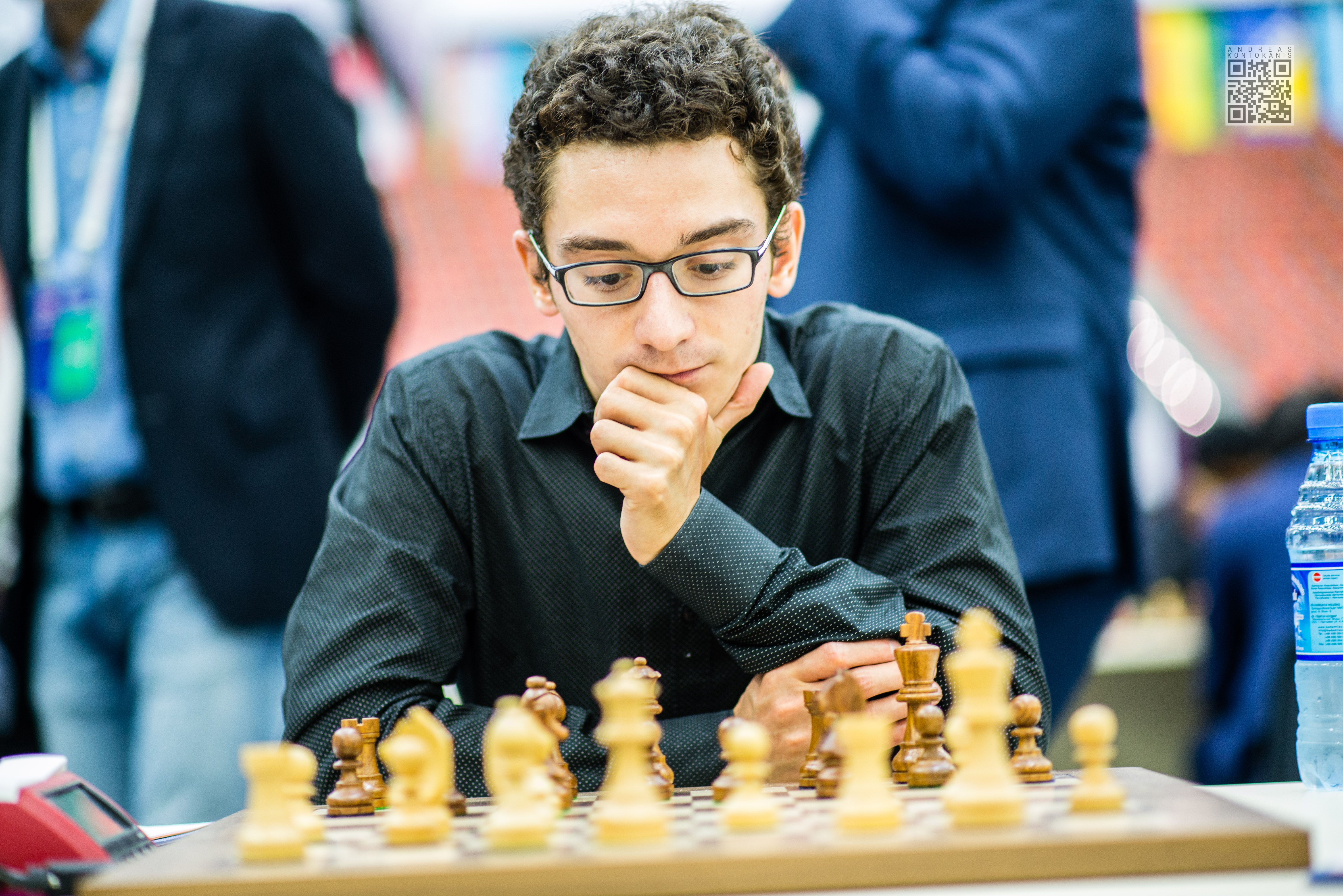 Fabiano Caruana